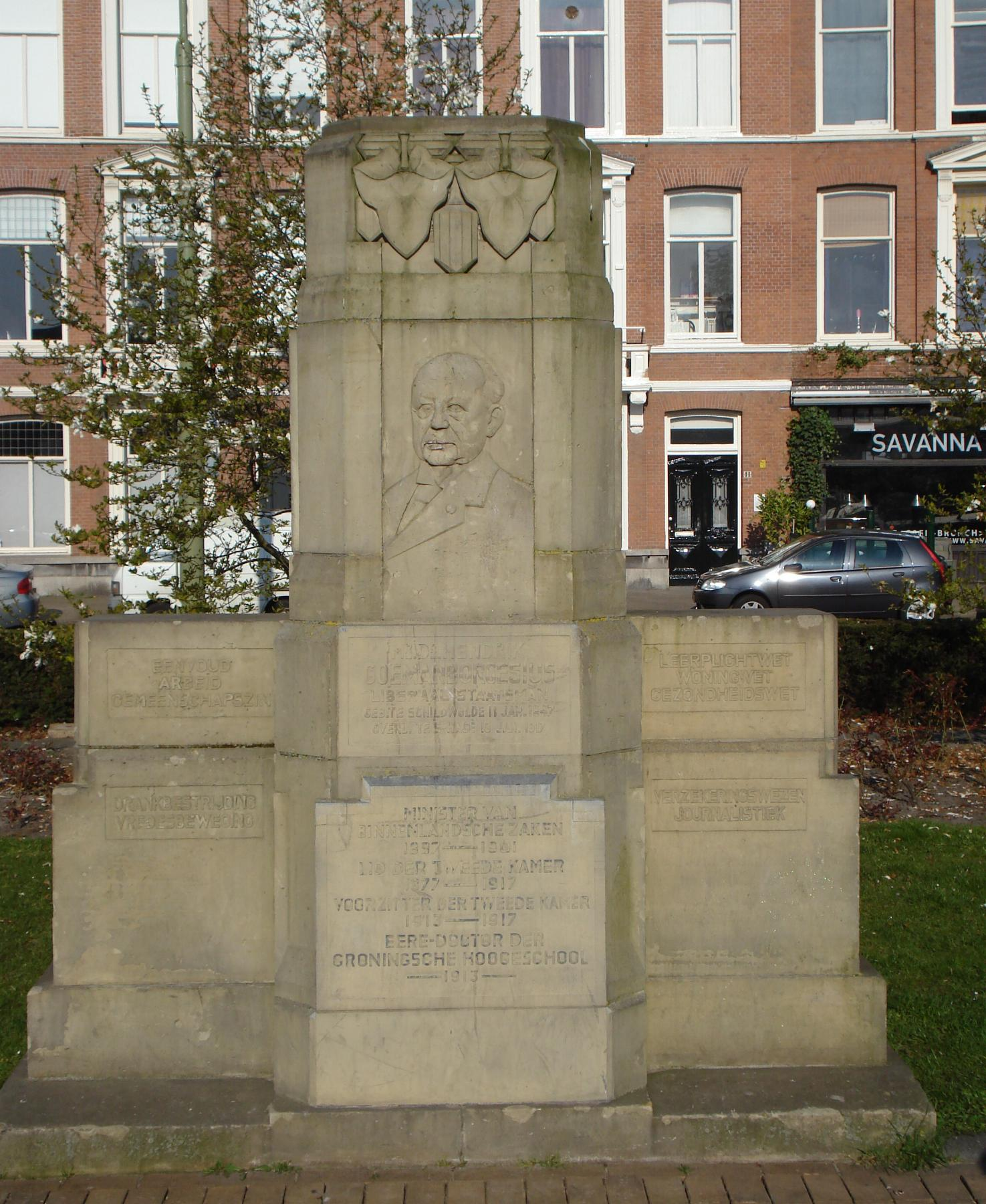 Den Haag, Prins Hendrikplein. H. Goeman Borgesiusmonument van Johan Coenraad Altorf. The Hague/The Netherlands.